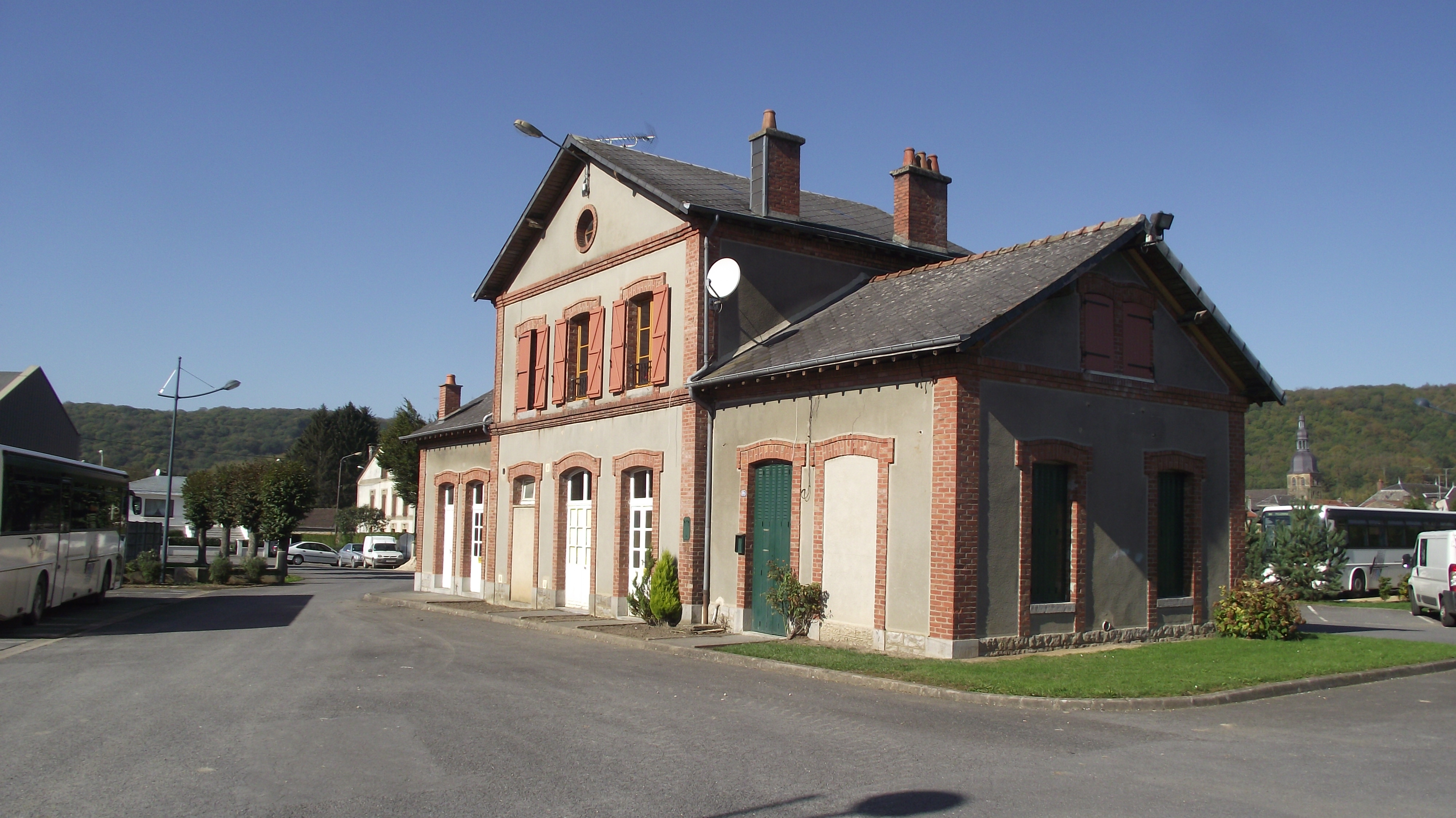 Station CFDA in Gespunsart